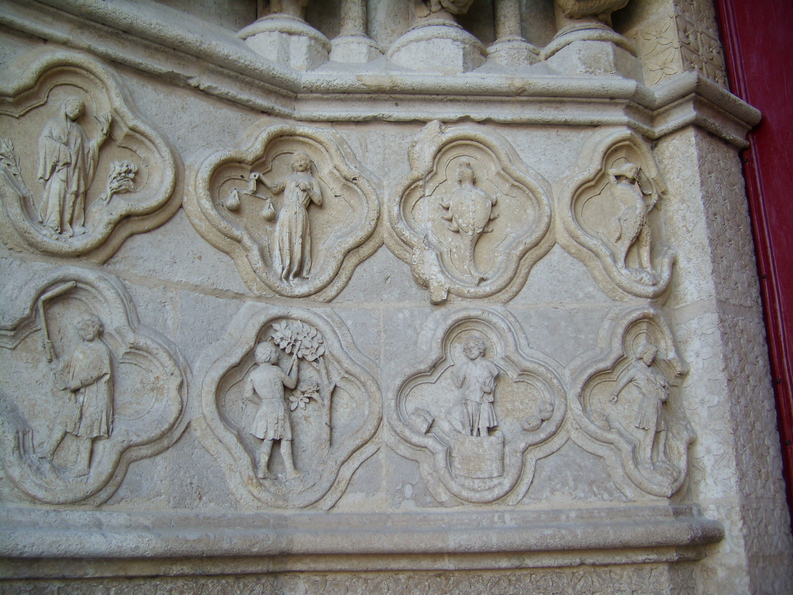 Facade de ND d'Amiens : Signes du zodiaque (Balance/ Scorpion / Sagitaire) et occupations agrestes (Cueillete des fruits/ Vinification / Semis)